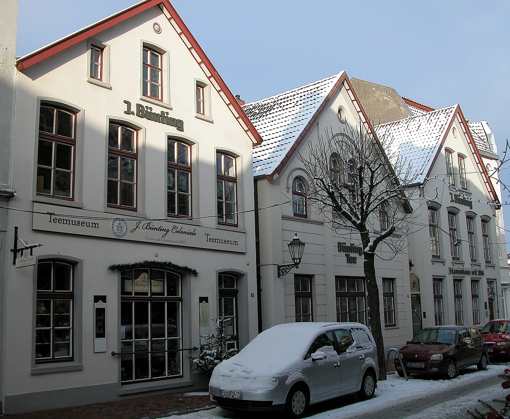 Leer: Drei Bünting-Häuser in der Brunnenstraße: Teemuseum (links) und Stammhaus (rechts).